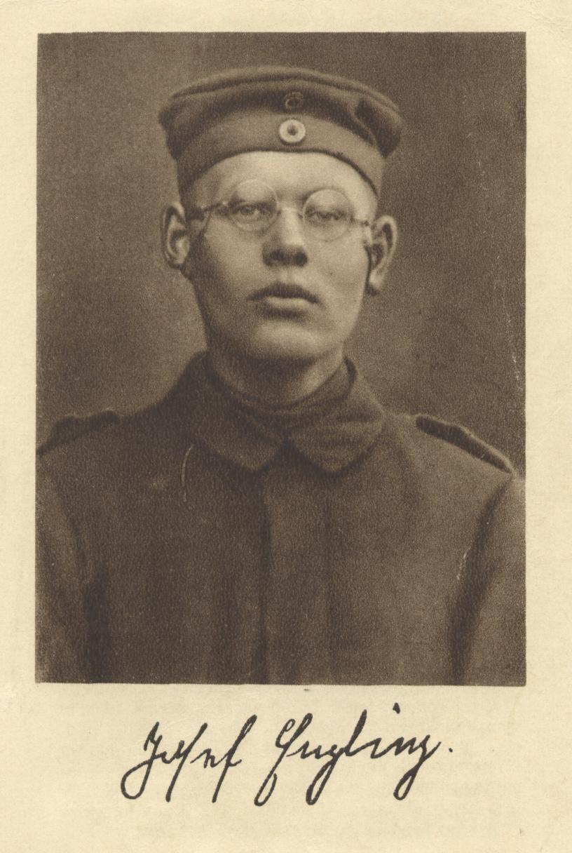 Josef Engling als Soldat im 1. Weltkrieg